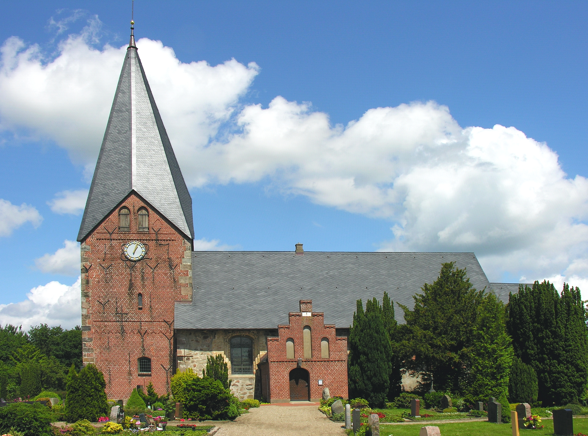 Die St-Nikolai-Kirche in Quern wurde als Granitquadermauerwerk begonnen; der Bau wurde dann mit Feldsteinmauerwerk fortgesetzt. Erbaut um 1200 - Foto 2012 Wolfgang Pehlemann DSC09471